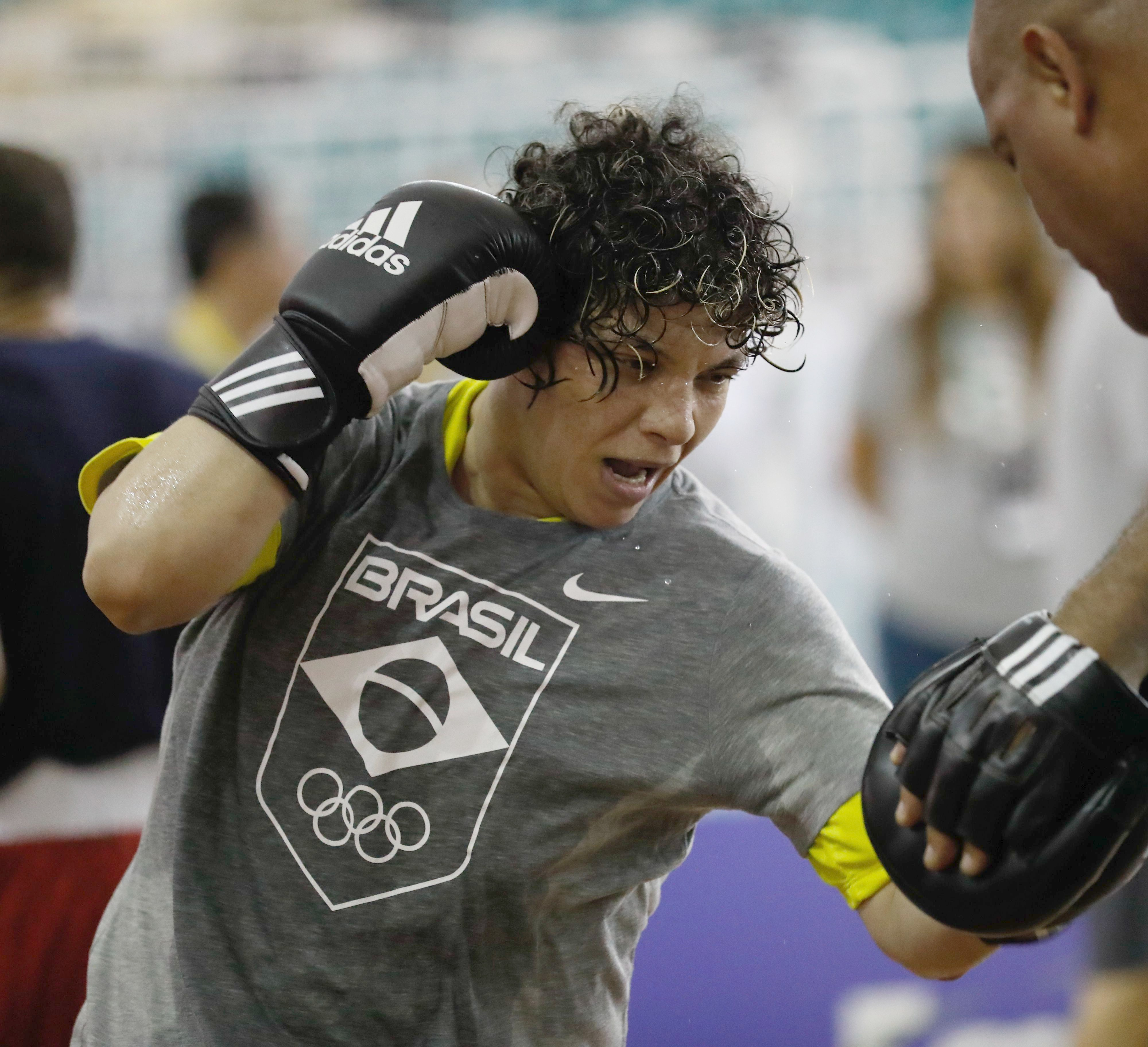 Rio de Janeiro - Andreia Bandeira, atleta da seleção brasileira de boxe, durante treino para os Jogos Olímpicos Rio 2016 na base do Time Brasil, na Urca (Fernando Frazão/Agência Brasil)